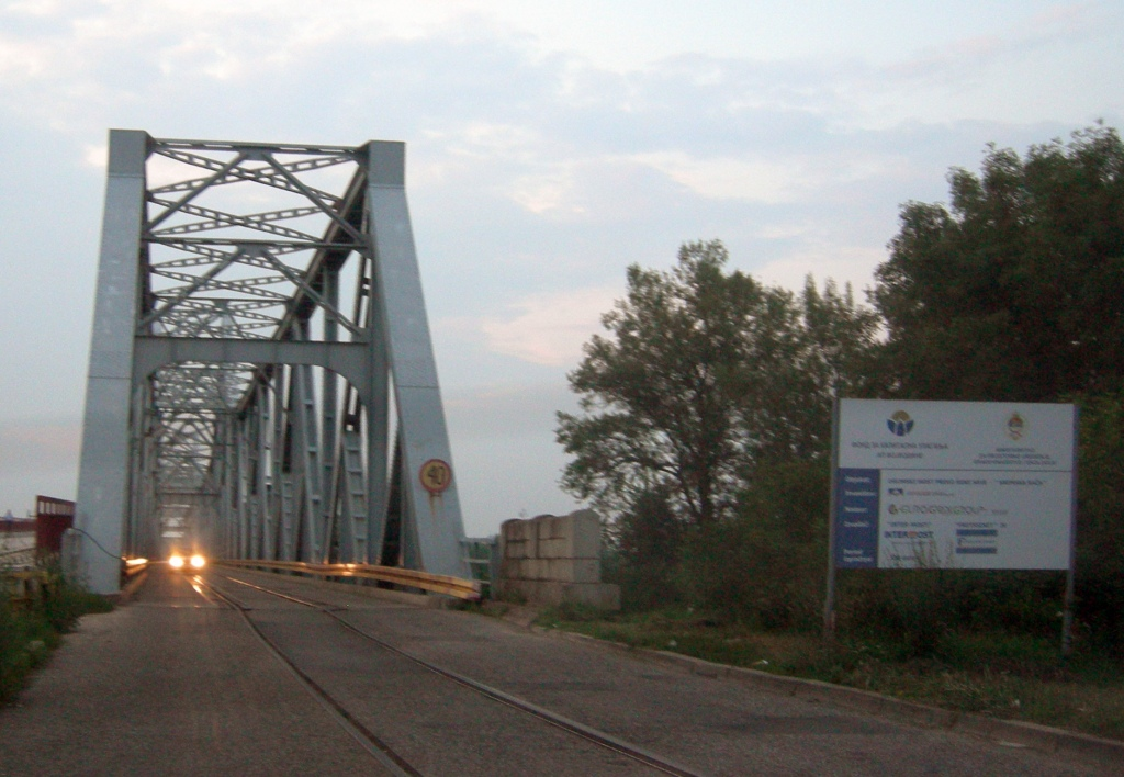 Мост преко Саве у Рачи, на граници БиХ и Србије.